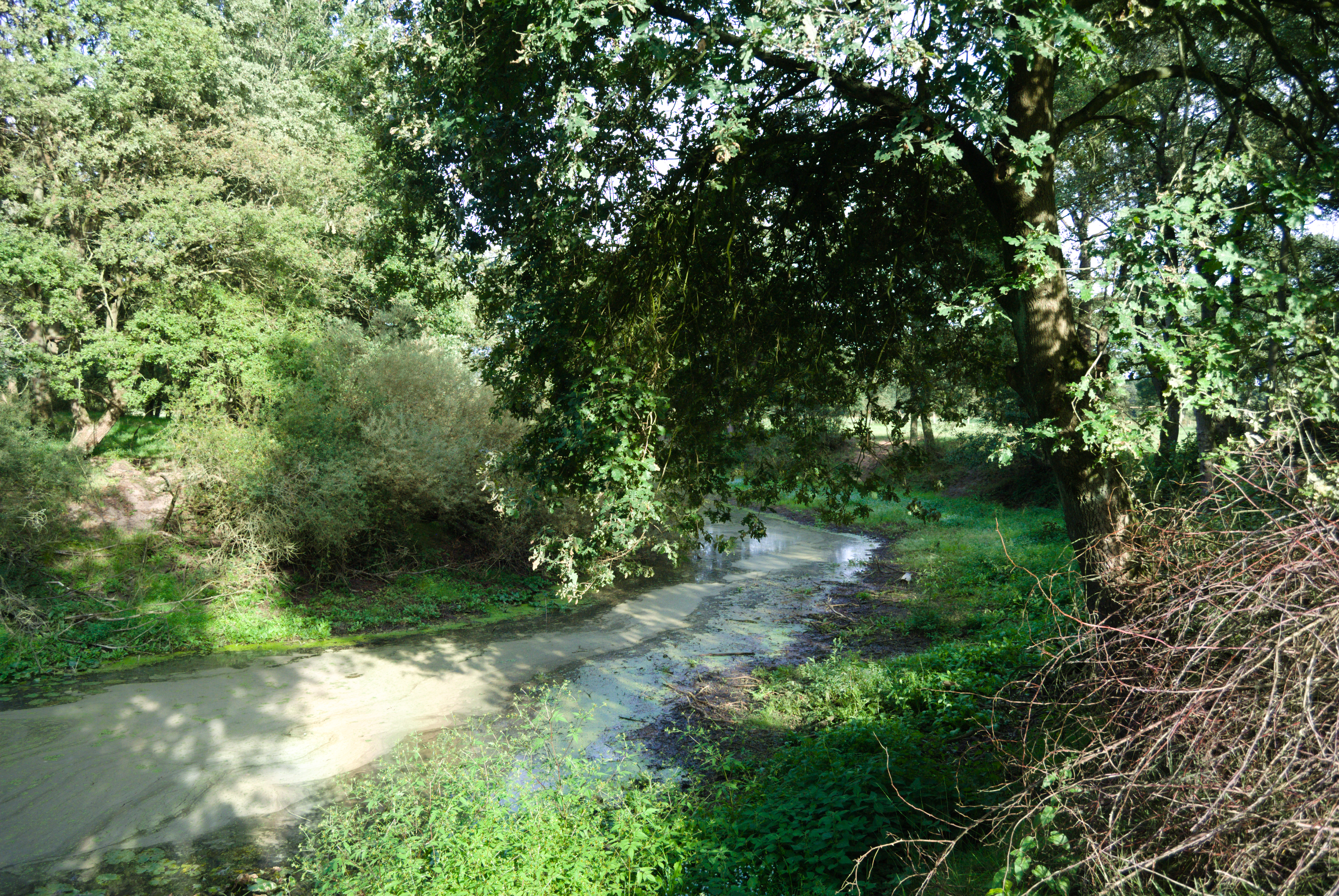 Vechte-Altarm Kalle bei Hoogstede